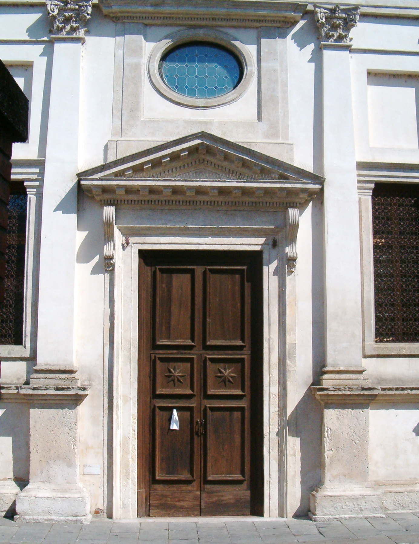 Vicenza, Oratorio di San Nicola da Tolentino (XVI sec.), dettaglio dell'ingresso.